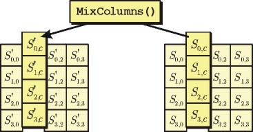 AES Mix Column procedure